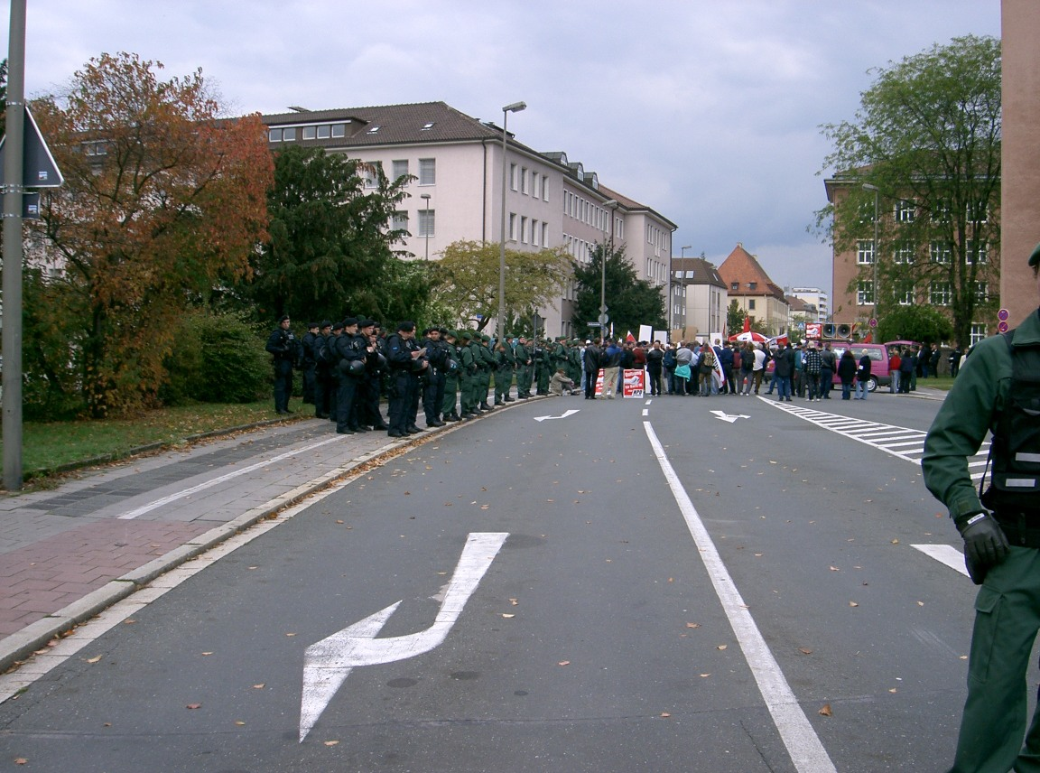 2 Züge der Bay. Bereitschaftspolizei (davon 1 Zug USK) bei der Absicherung einer NPD Demonstration in Erlangen